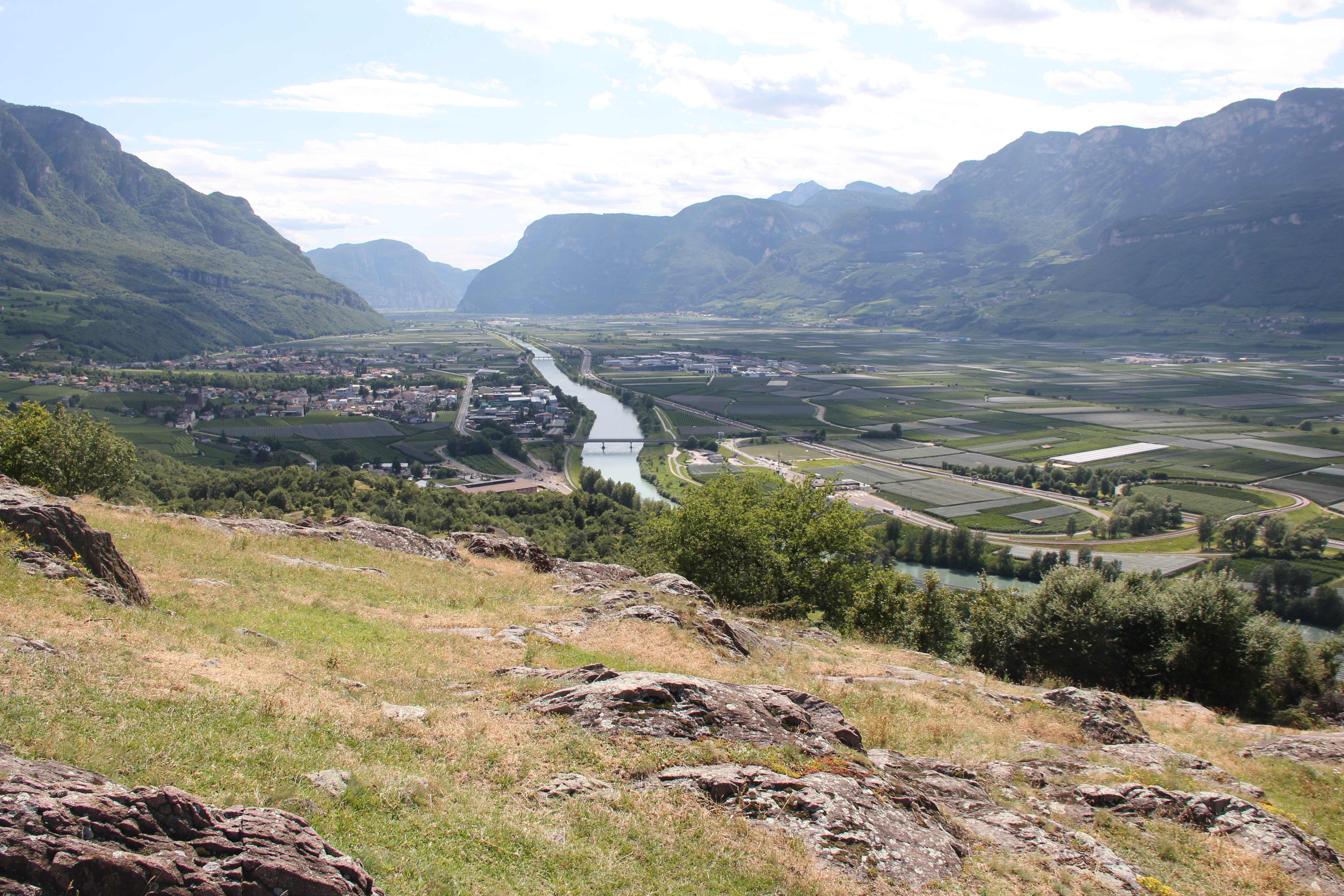 Blick von Castelfeder nach Süden in das Etschtal